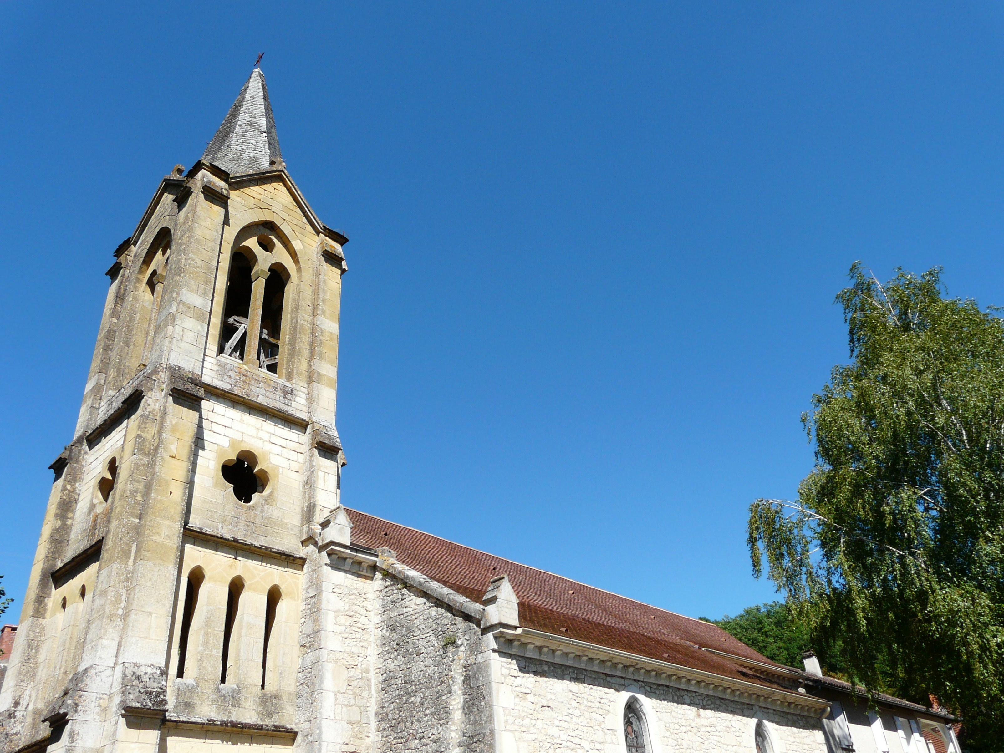 L'église Sainte-Anne de Peyrillac, Peyrillac-et-Millac, Dordogne, France.